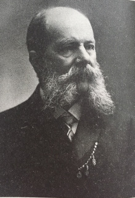 Josef Antonín Schneider-Svoboda